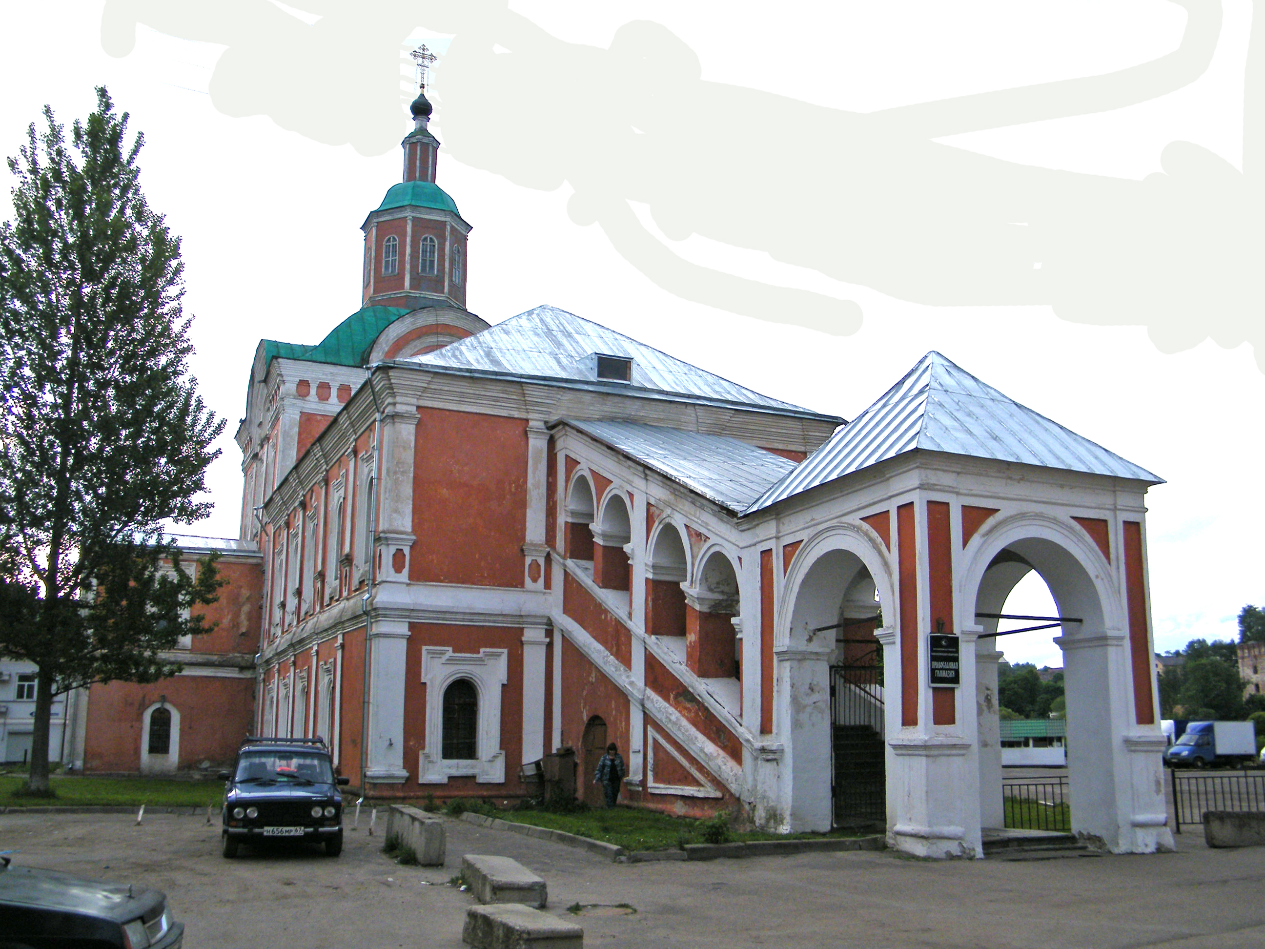 Церковь Николая Чудотворца